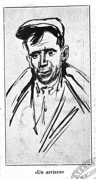 Un arriero.